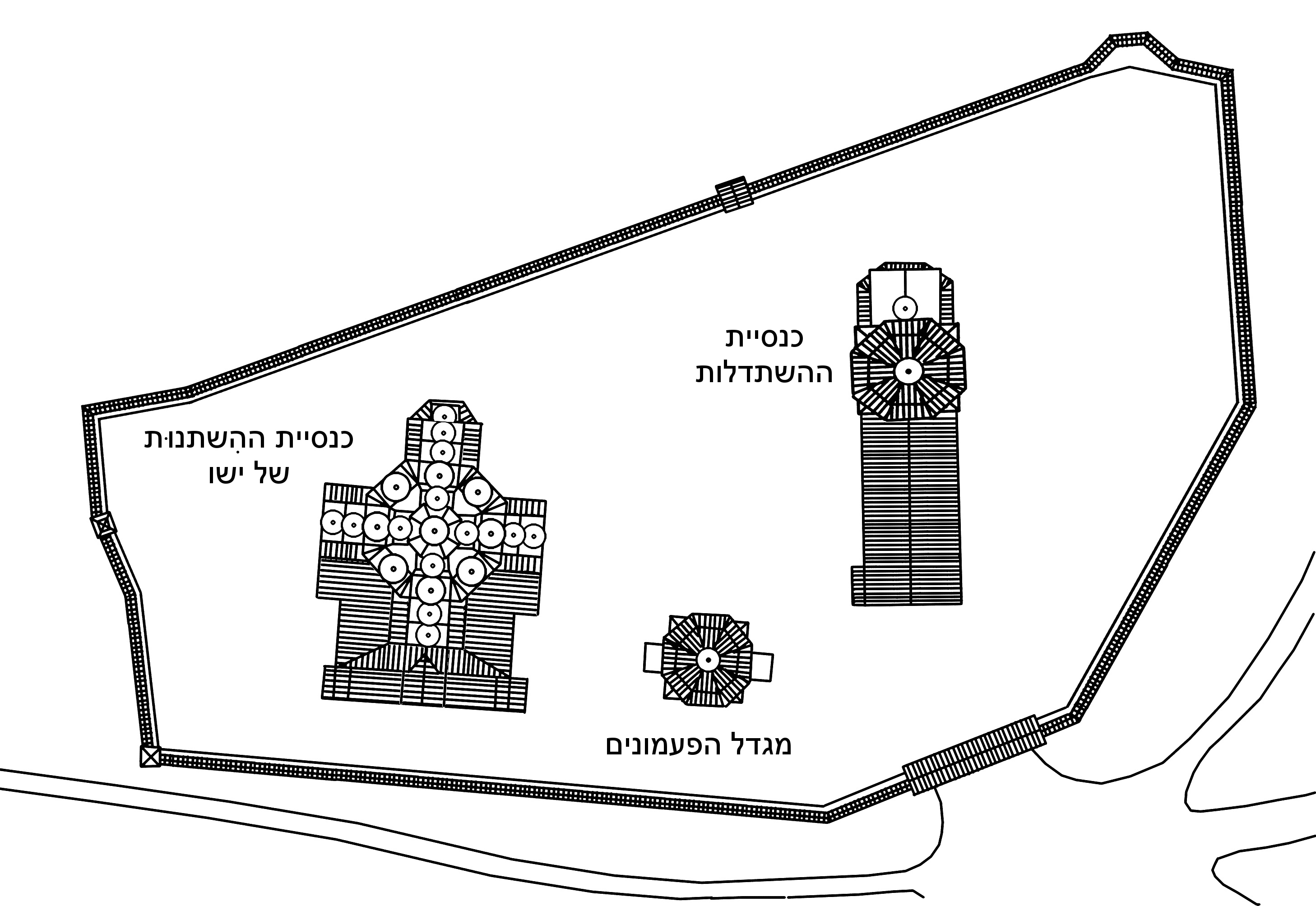 מתחם קיז'י Kizhi